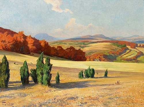 Wacholderheide und Aremberg, Öl auf Leinwand, 61 x 81 cm, signiert »F. v. Wille«